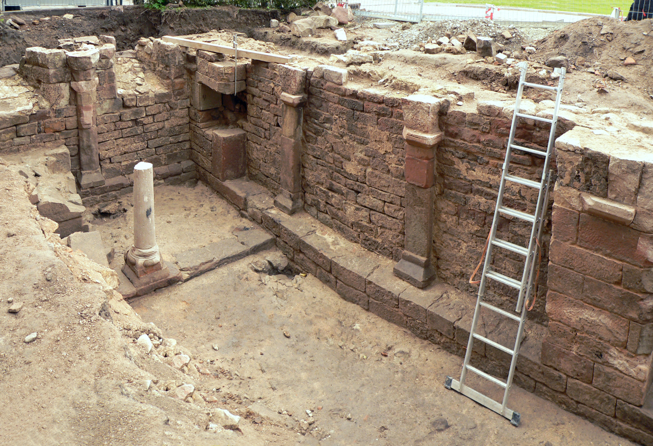 Ostwand und Südwand der Krypta am Nörten-Hardenberger Stiftsplatz, links Altar, davor freistehende Säule, in der Ecke ein Sakramentenhäuschen, Tragepfeiler in der Mauer